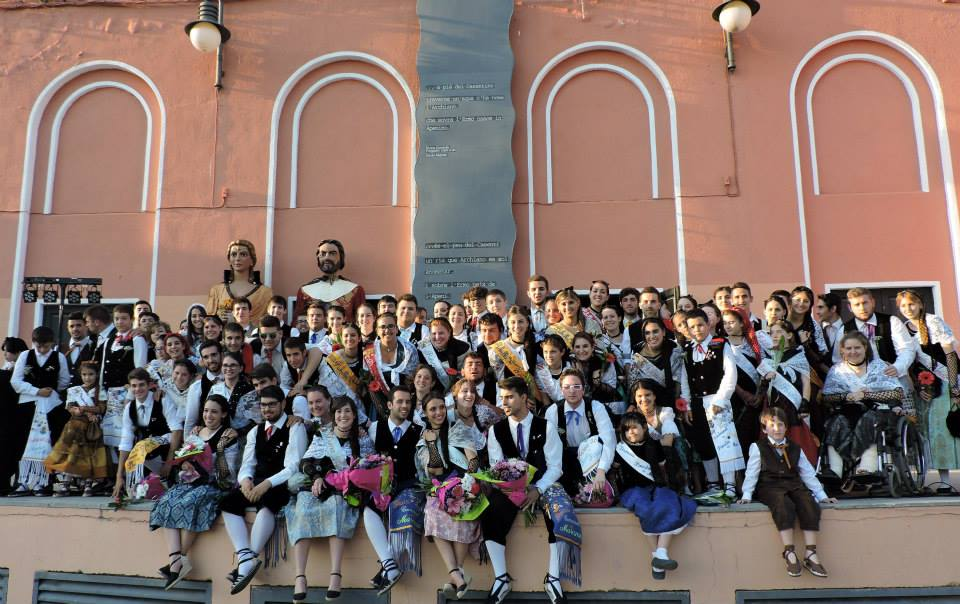 Pubillatge General